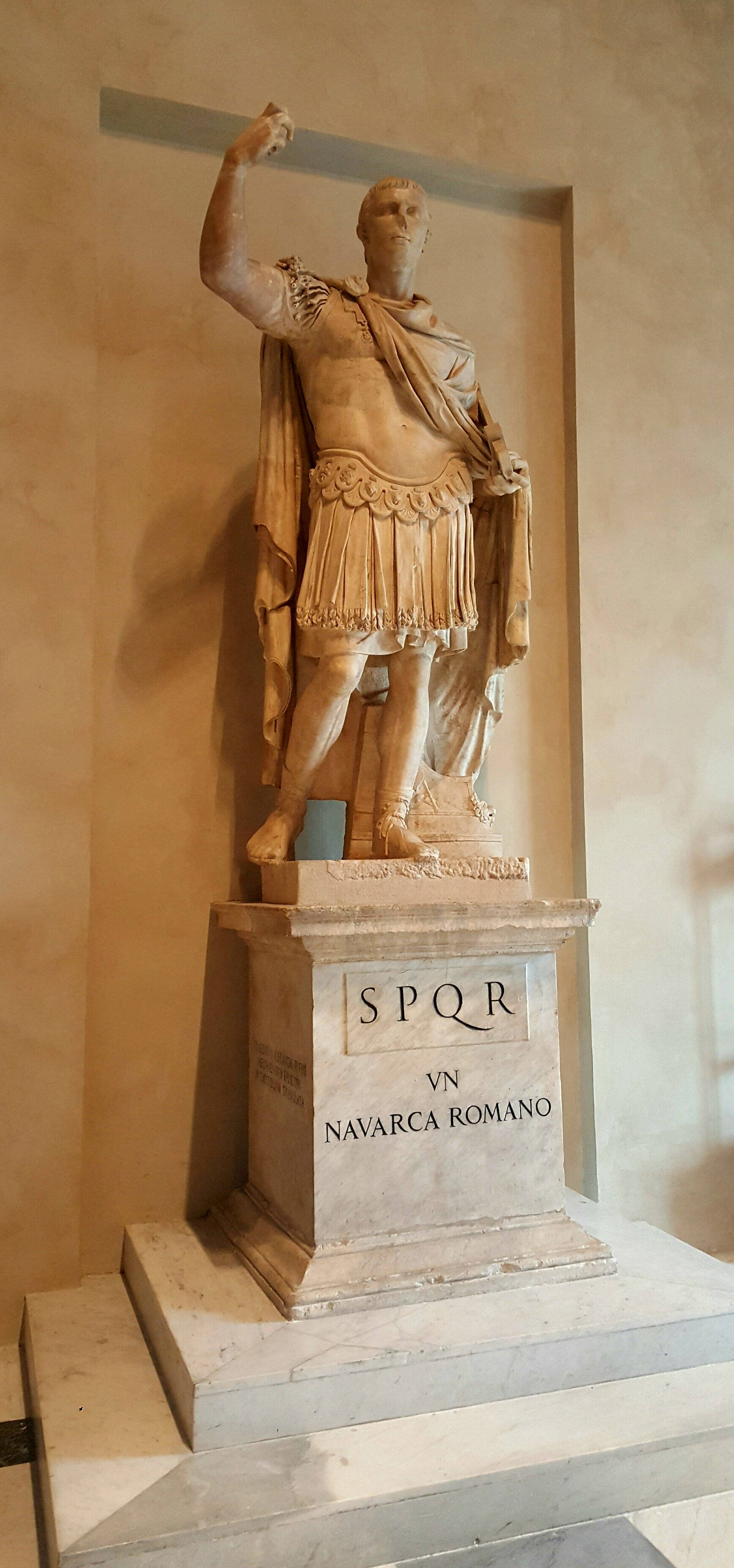 Statua del navarca romano in Sala Giulio Cesare a Roma.